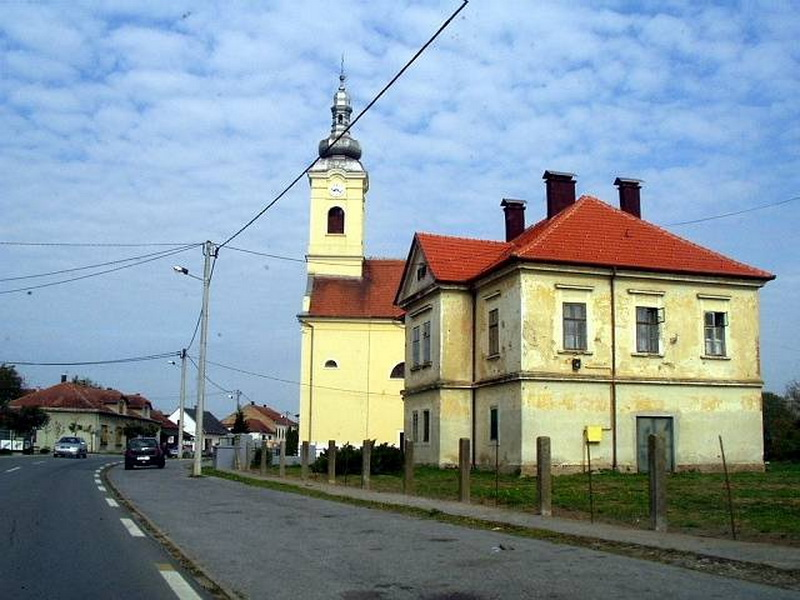 Veliki Grđevac - The Church